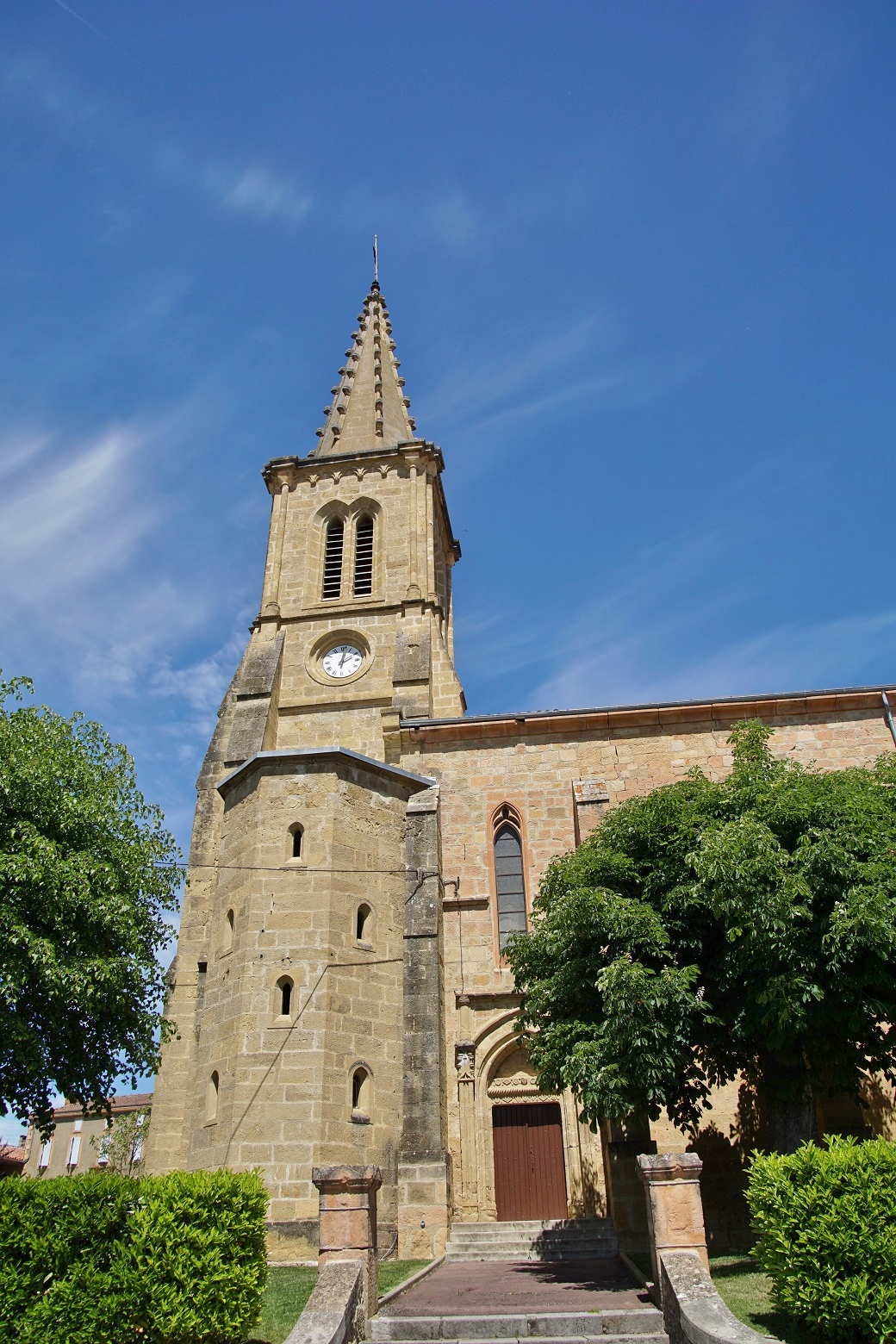 Haute Garonne